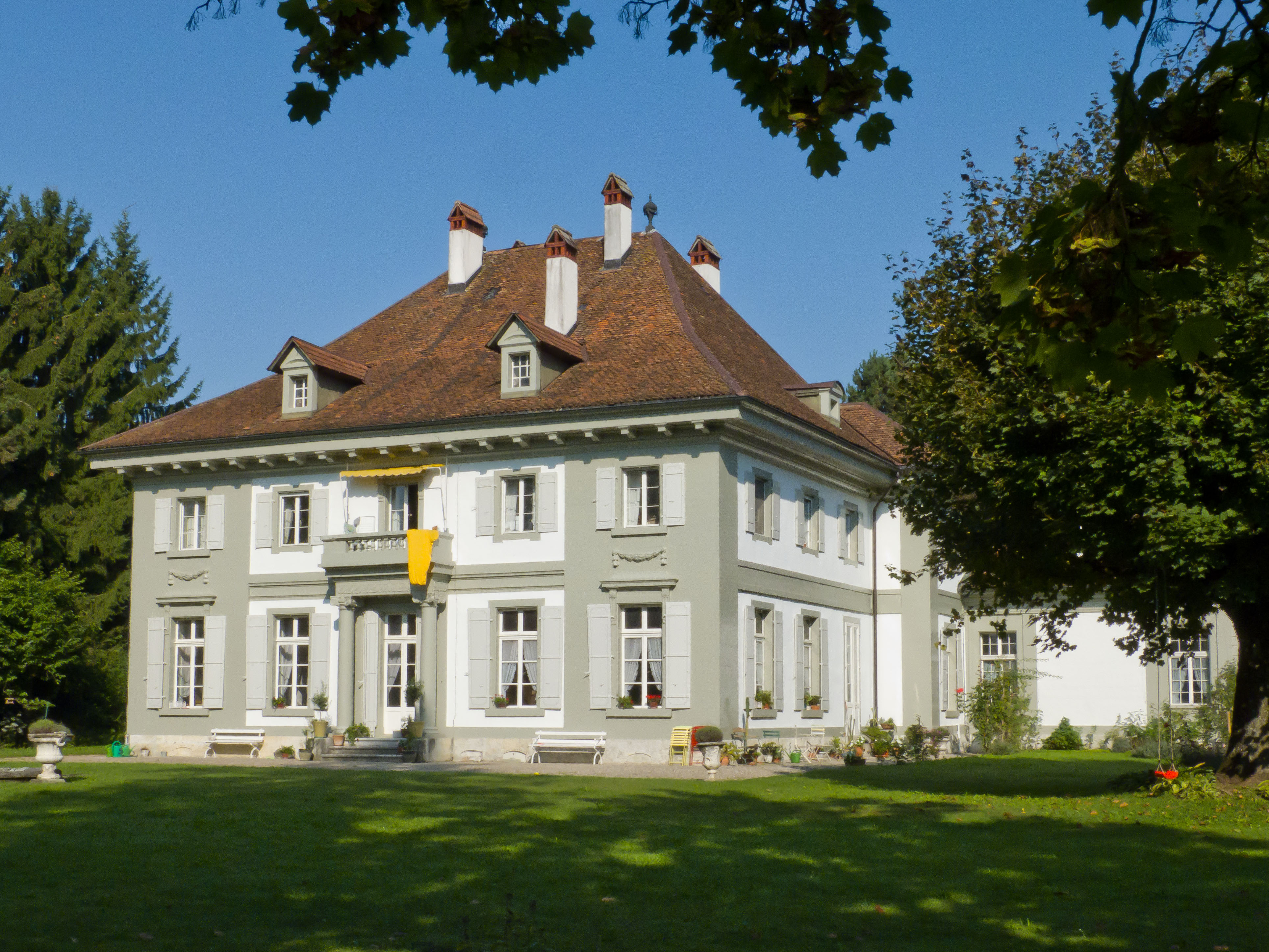 Kirchberg, Kleehof-Südfassade